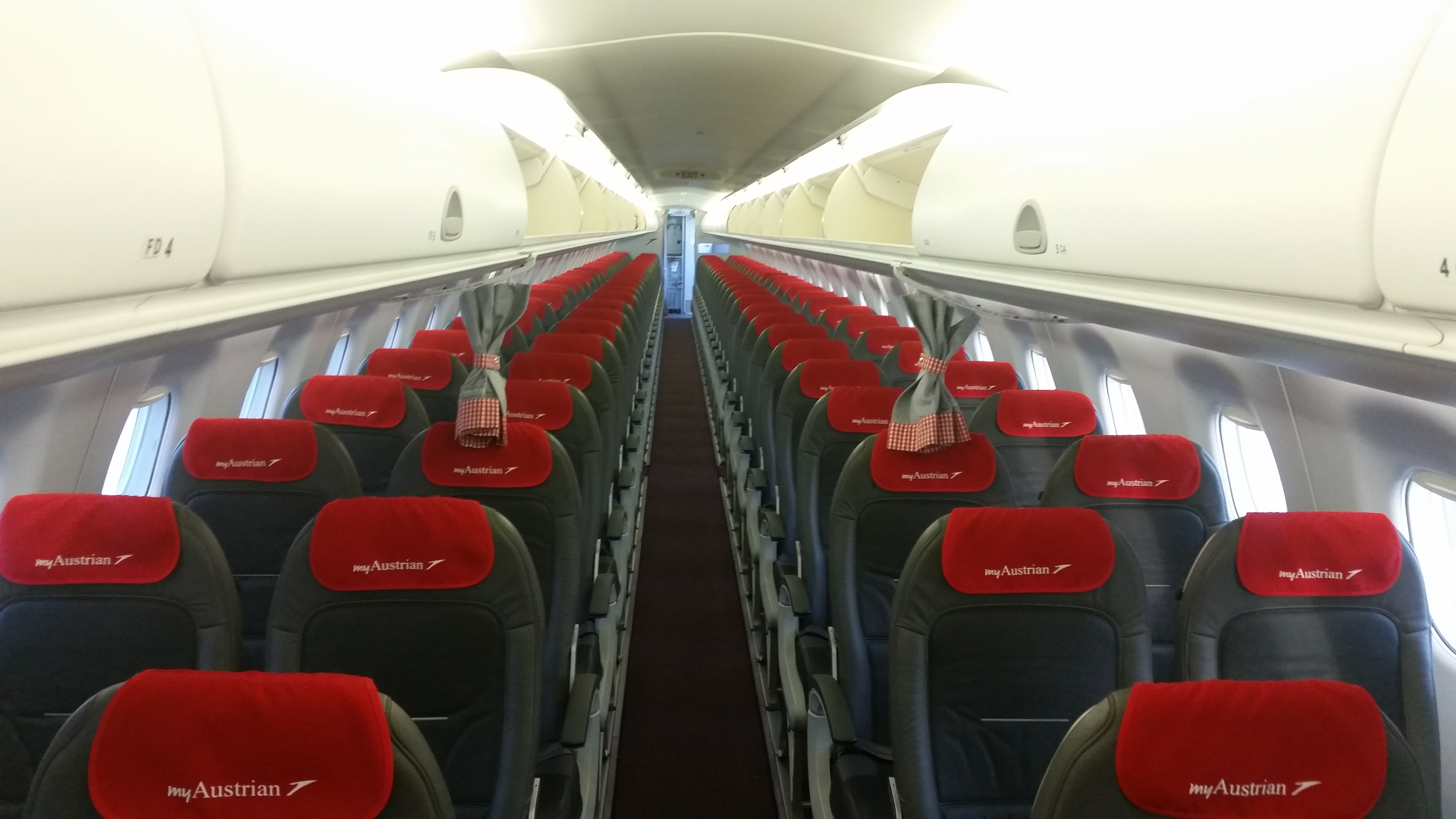 Kabine einer E195